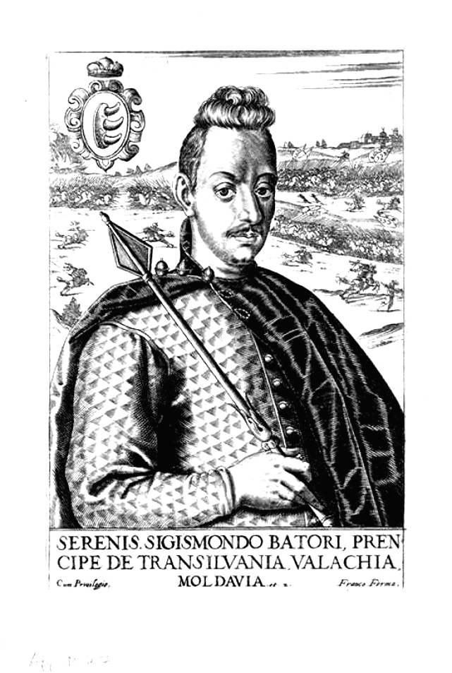 Báthory Zsigmond – 1596.